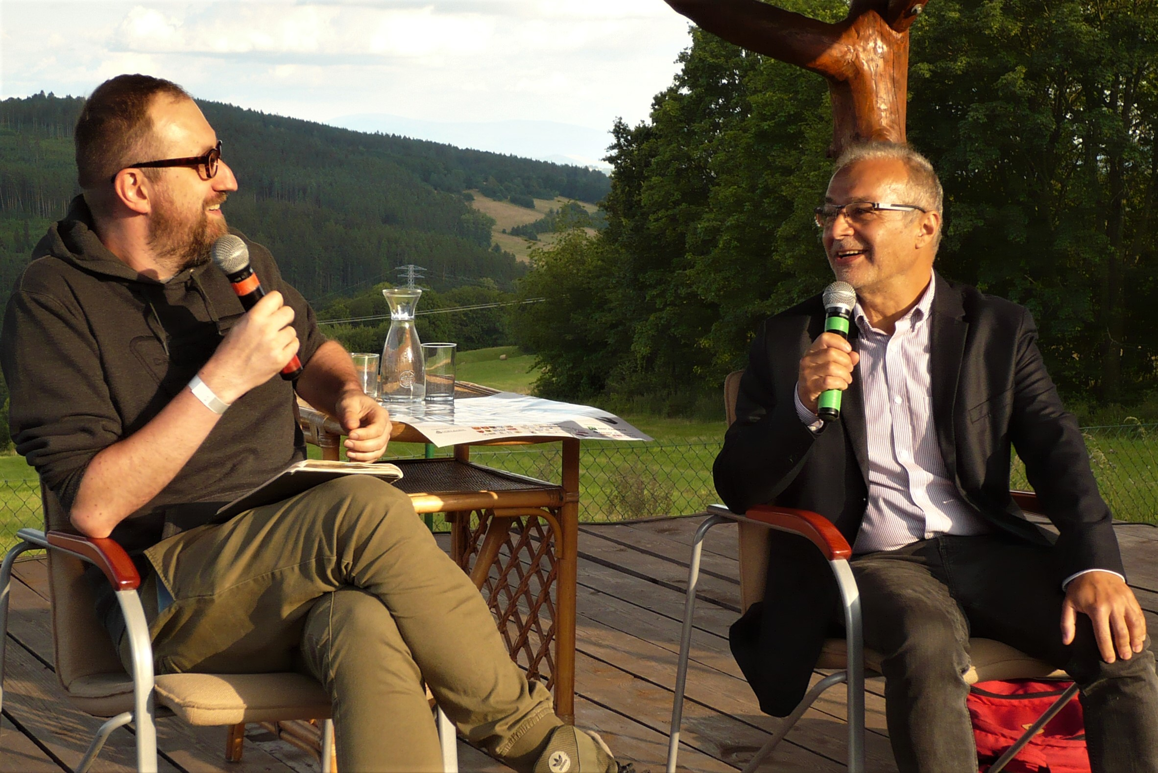 Michał Nogaś, Maciej Hen, VI Festiwal Góry Literatury, 17.07.2020